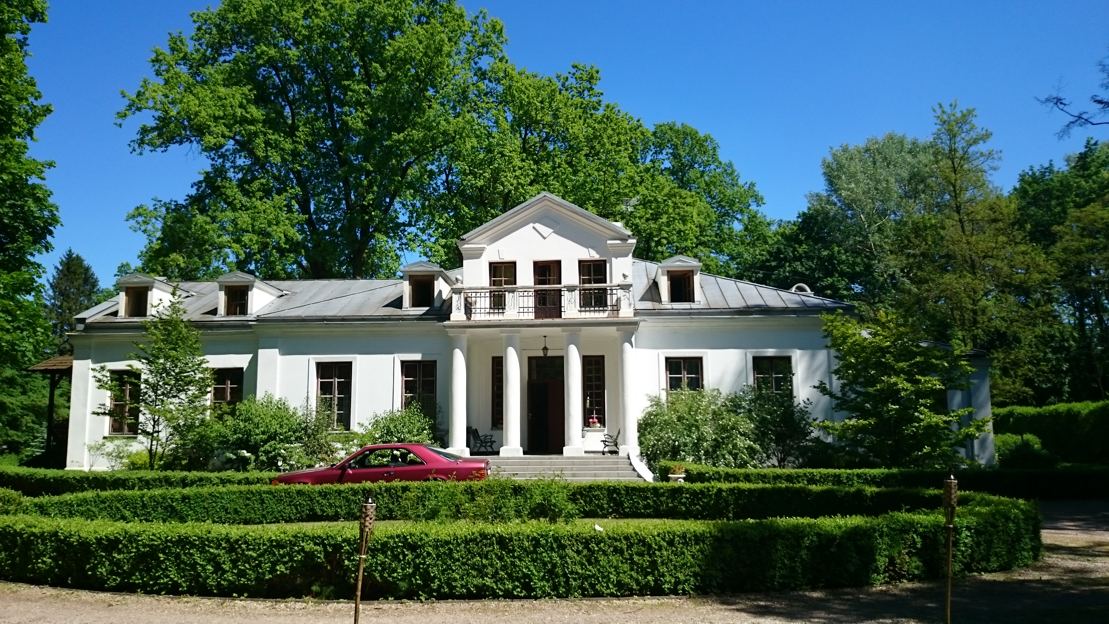 Dwór Radzin w Celestynowie (powiat otwocki)